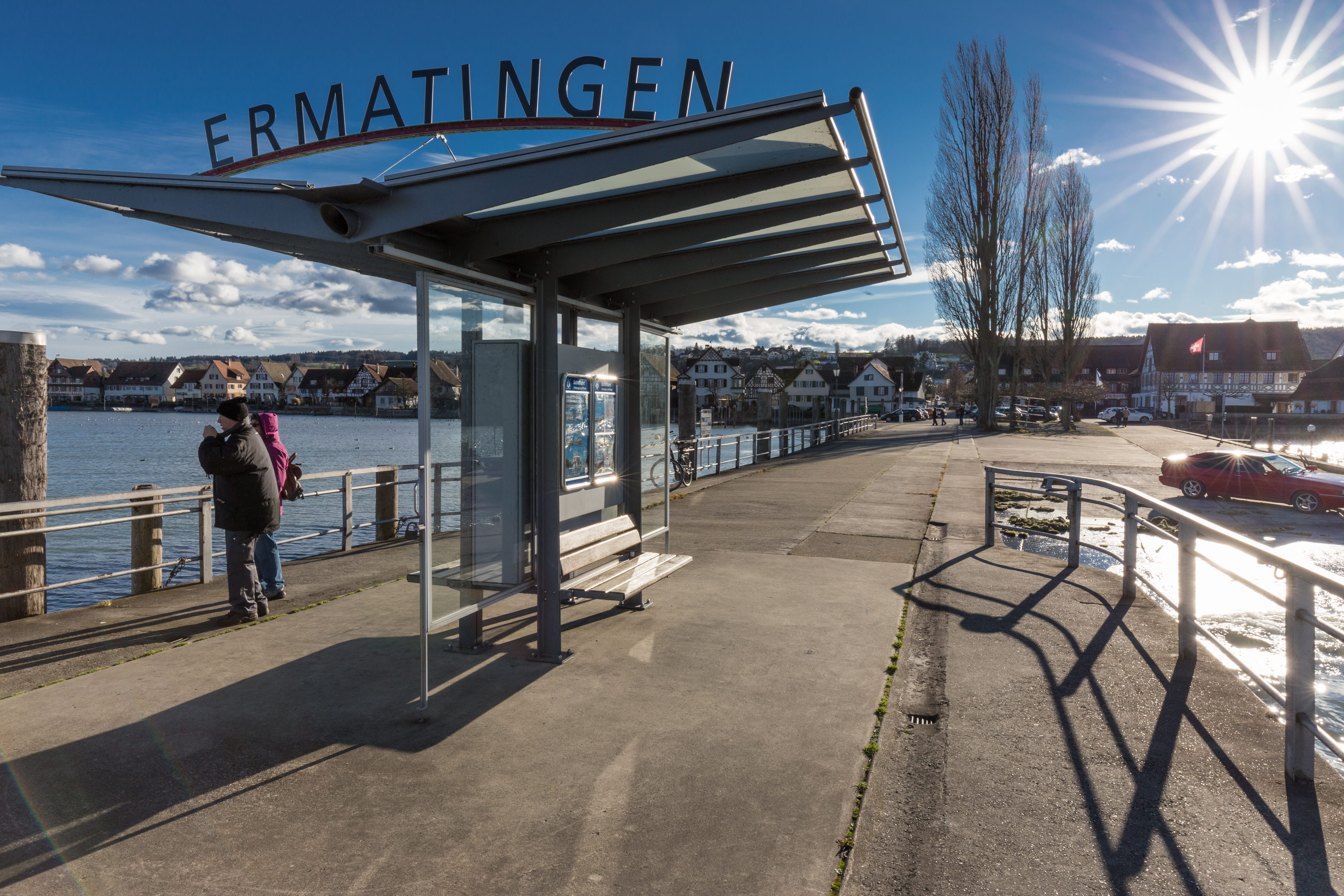 Schiffslände Ermatigen